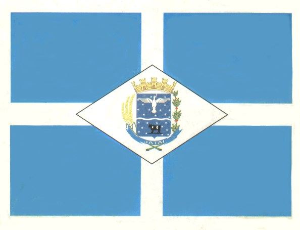 Bandeira do Município de Jataí, em Goiás, no Brasil.